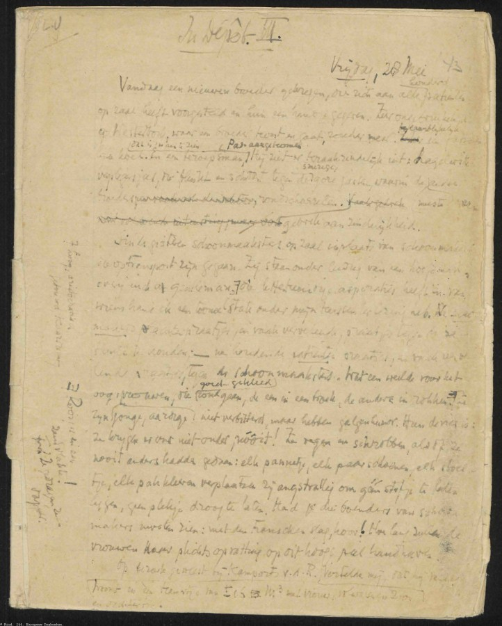 Eerste bladzijde dagboek Philip Mechanicus